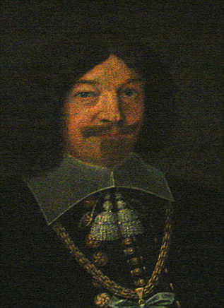 statholder i Norge